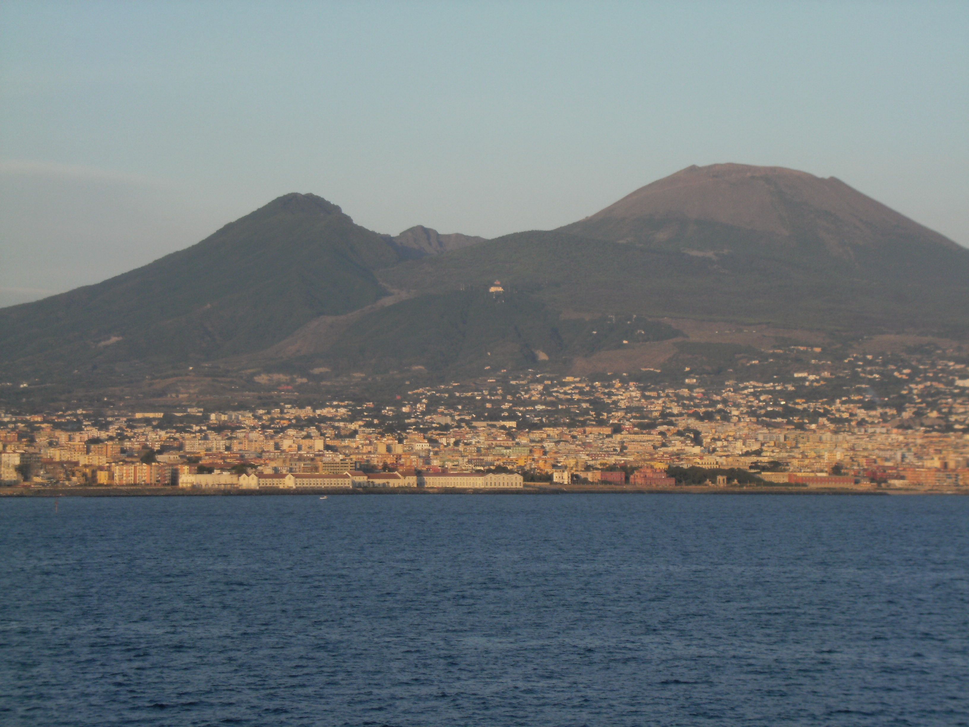 Vista di Napoli dal mare (qualità immagine non ottima).